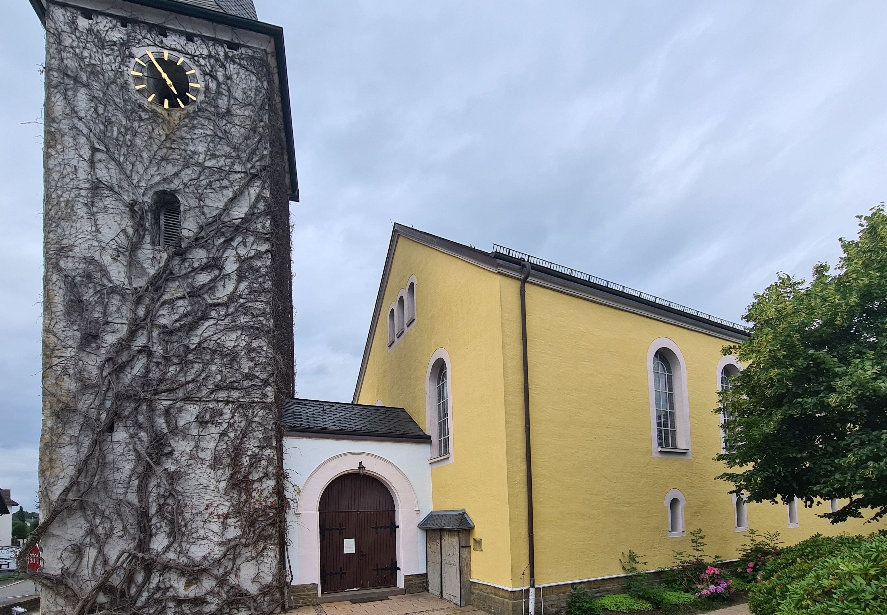 Der Haupteingang + Kirchenturm der ev. Kirche in Drabernderhöhe